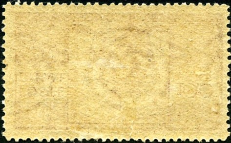 retro del francobollo da 100 lire serie democratica